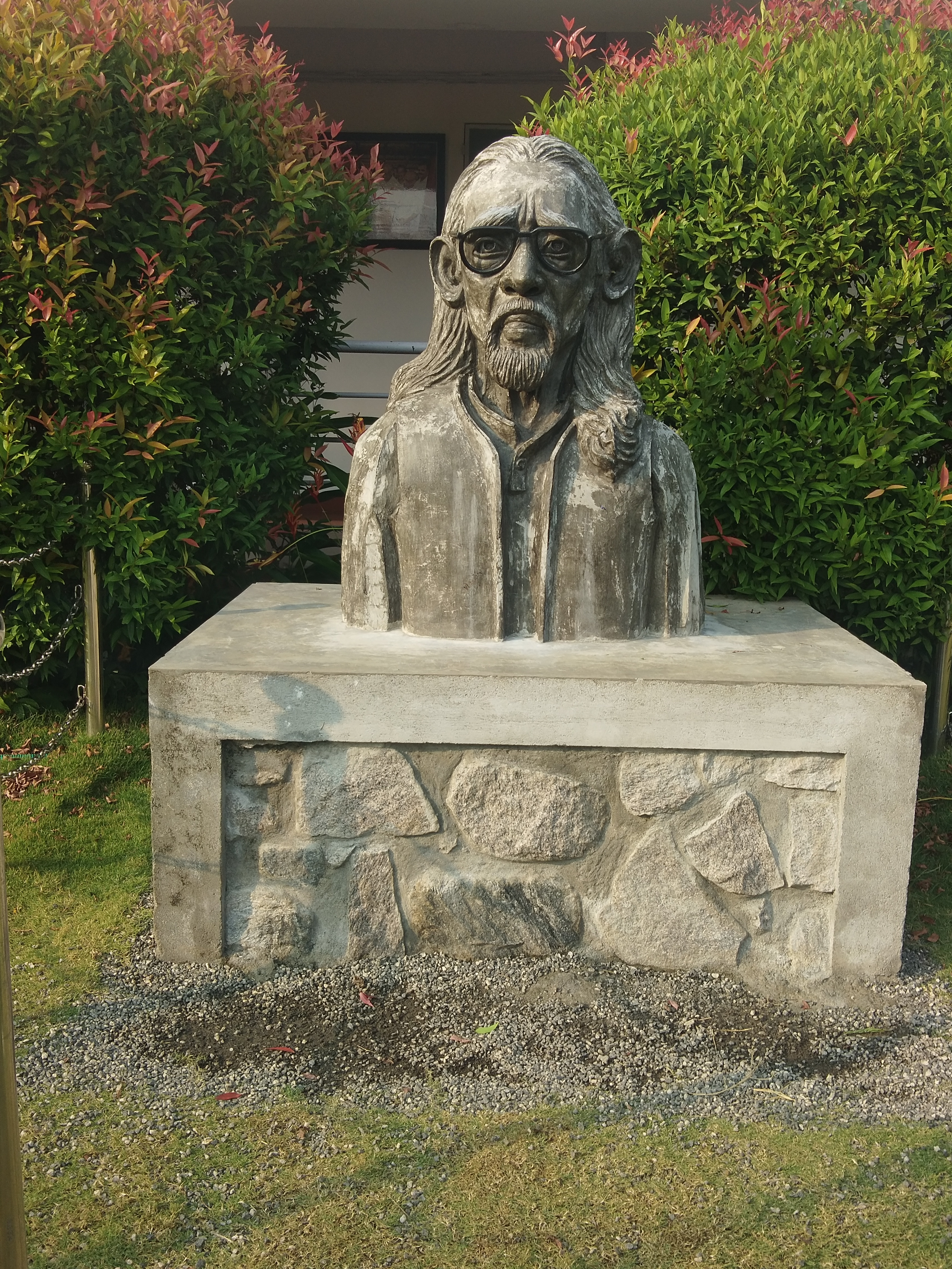 തസ്രാക്കിലെ ഒ വി വിജയൻ സ്മാരകത്തിലെ ഒ വി വിജയൻ്റെ പ്രതിമ